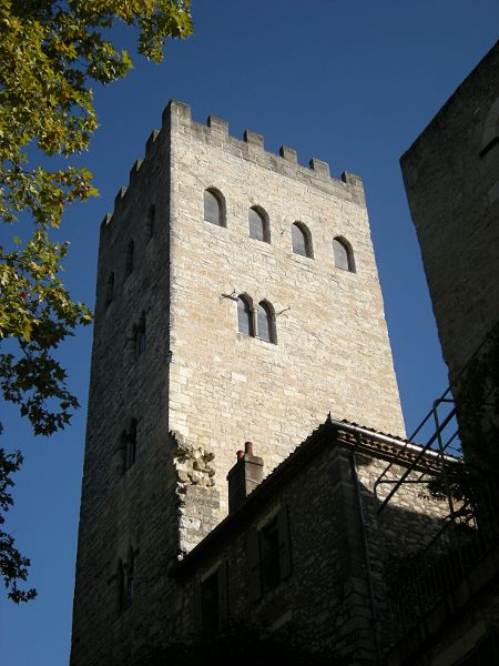 Tour du du pape Jean XXII à Cahors (département du Lot, France)